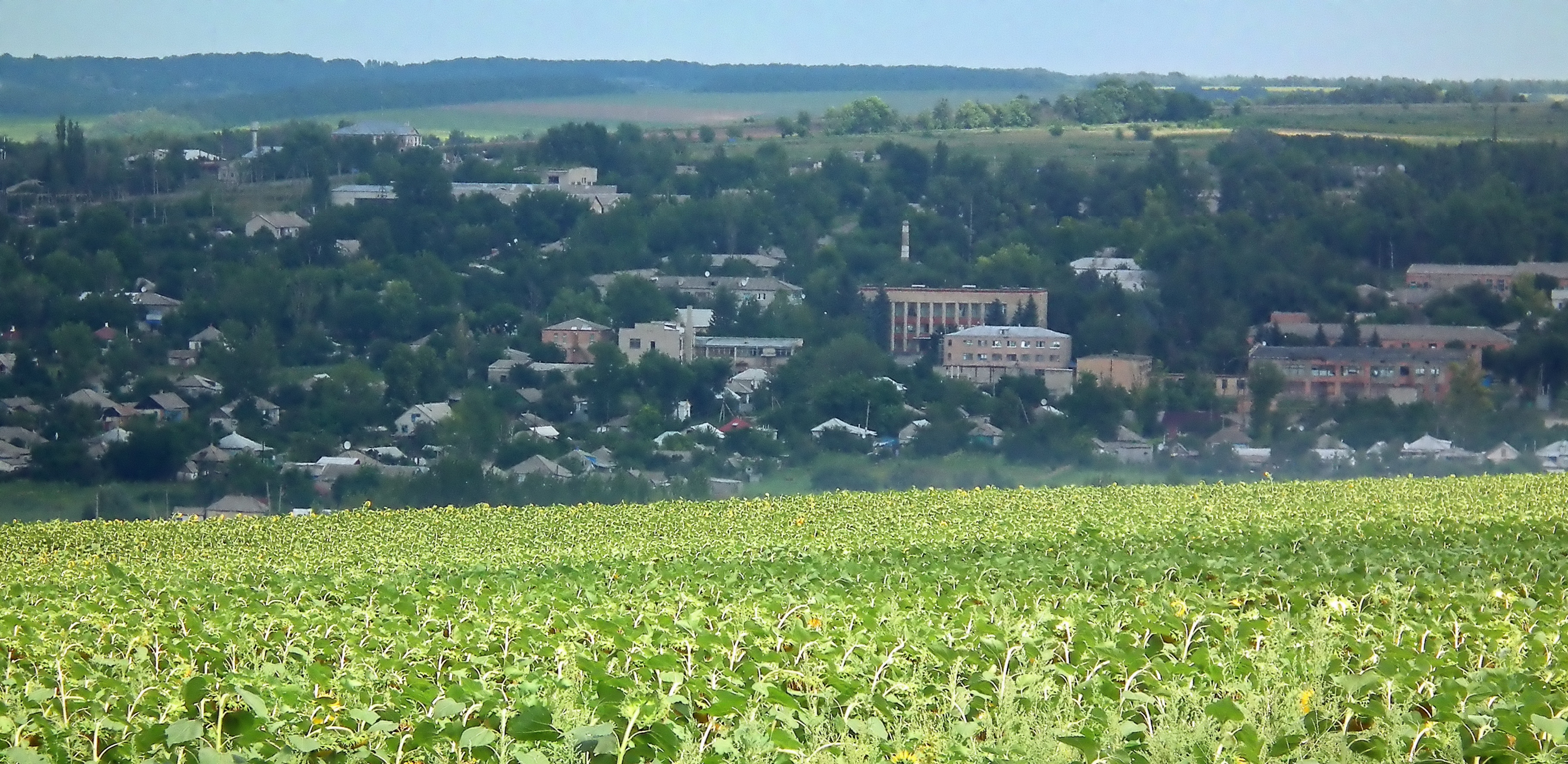 вид на Марковку со стороны сырзавода